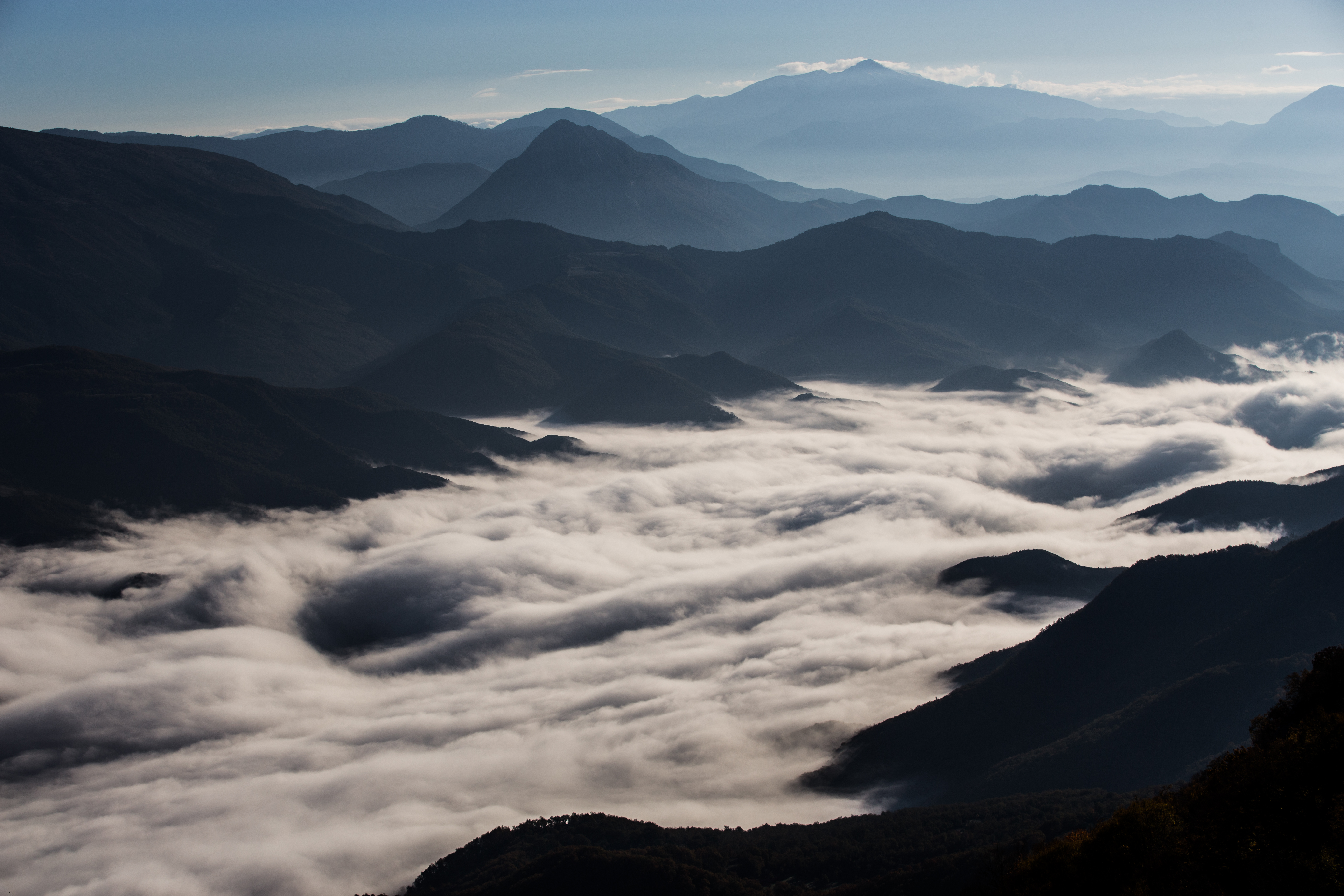 Vjose-Narte, Vlore